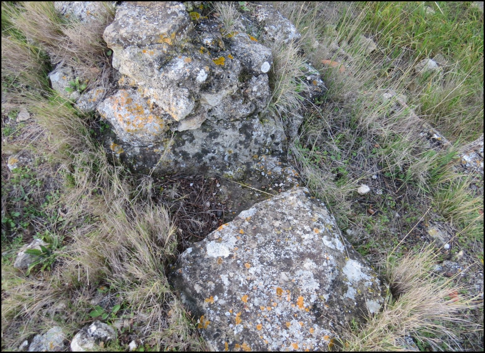 Déversoir pour le trop plein, grande piscine A, villa romaine de Vivios, Lespignan, Occitanie